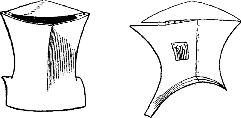 Турнірны шлем 15 ст.